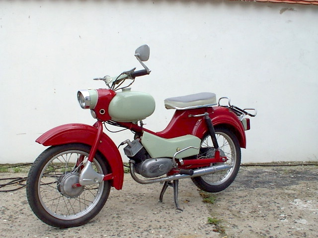 SR4-1_(Spatz).jpg